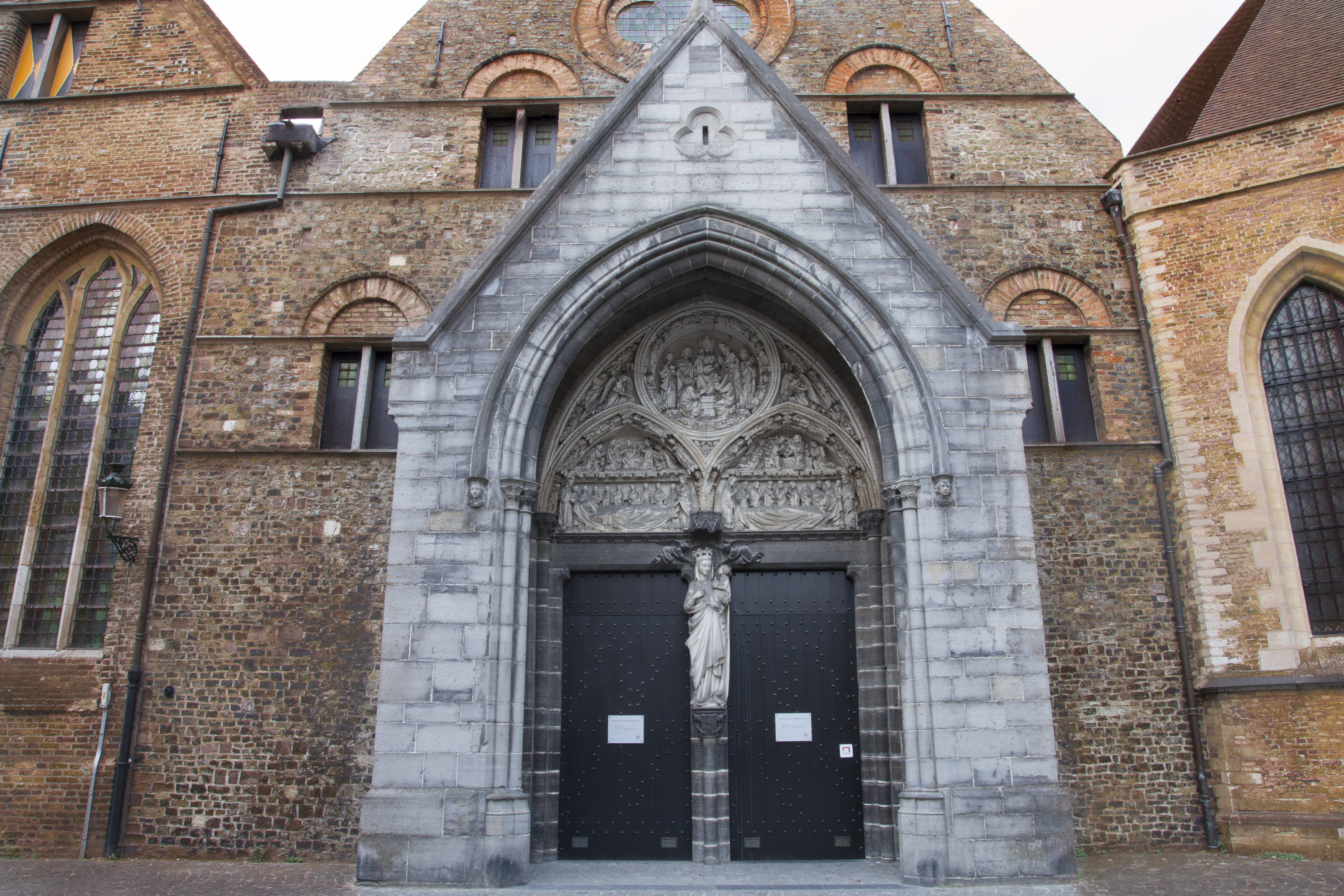 Brugge - Mariastraat 44 - Ingang St Jan - 82360